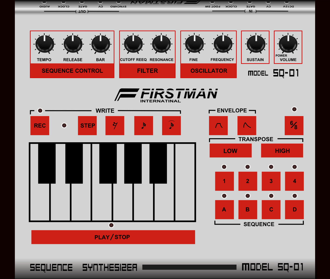 Multivox / Firstman SQ-01 (1981/1980[1]) — pattern sequencer integrated with monophonic synth, a forerunner of TB-303 References ↑ Firstman International (in Germany). SYNRISE. Archived from the original on 2009-05-26. "SQ/01 / mon syn ped kmi 990 (1980) Monophoner Synthesizer mit eingebautem 1024-Step-Sequencer. Ähnlich dem EDP WASP mit einer 13er-Folientastatur ausgestattet. Für Parameterveränderungen stehen neun Drehregler zur Verfügung."